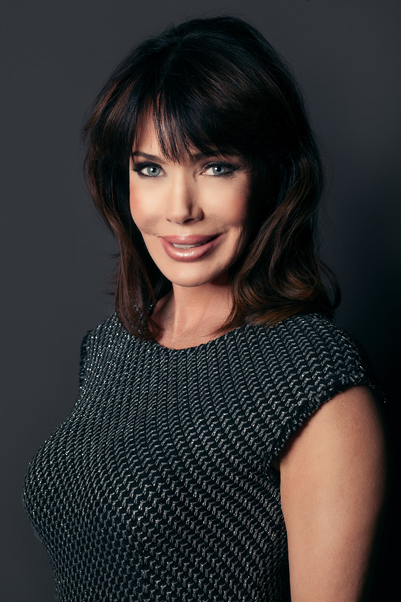 Amerikaans actrice